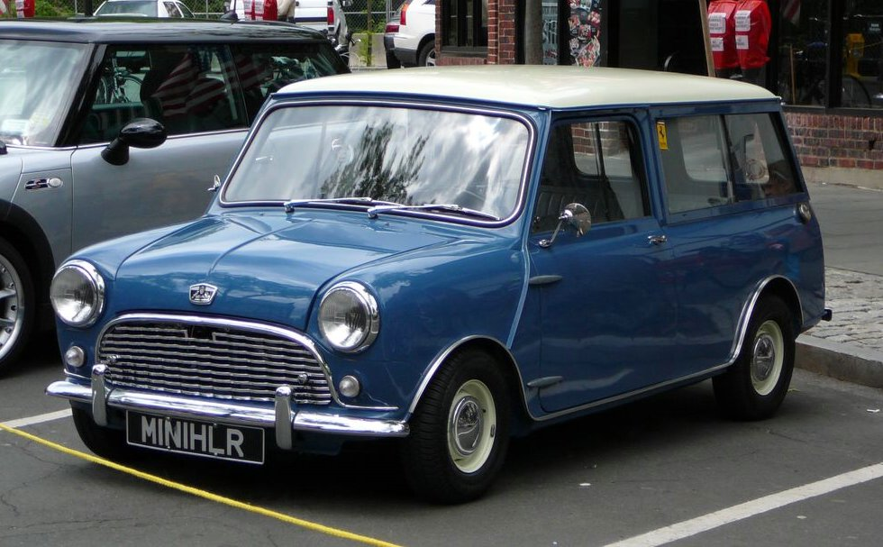 Mini Cooper